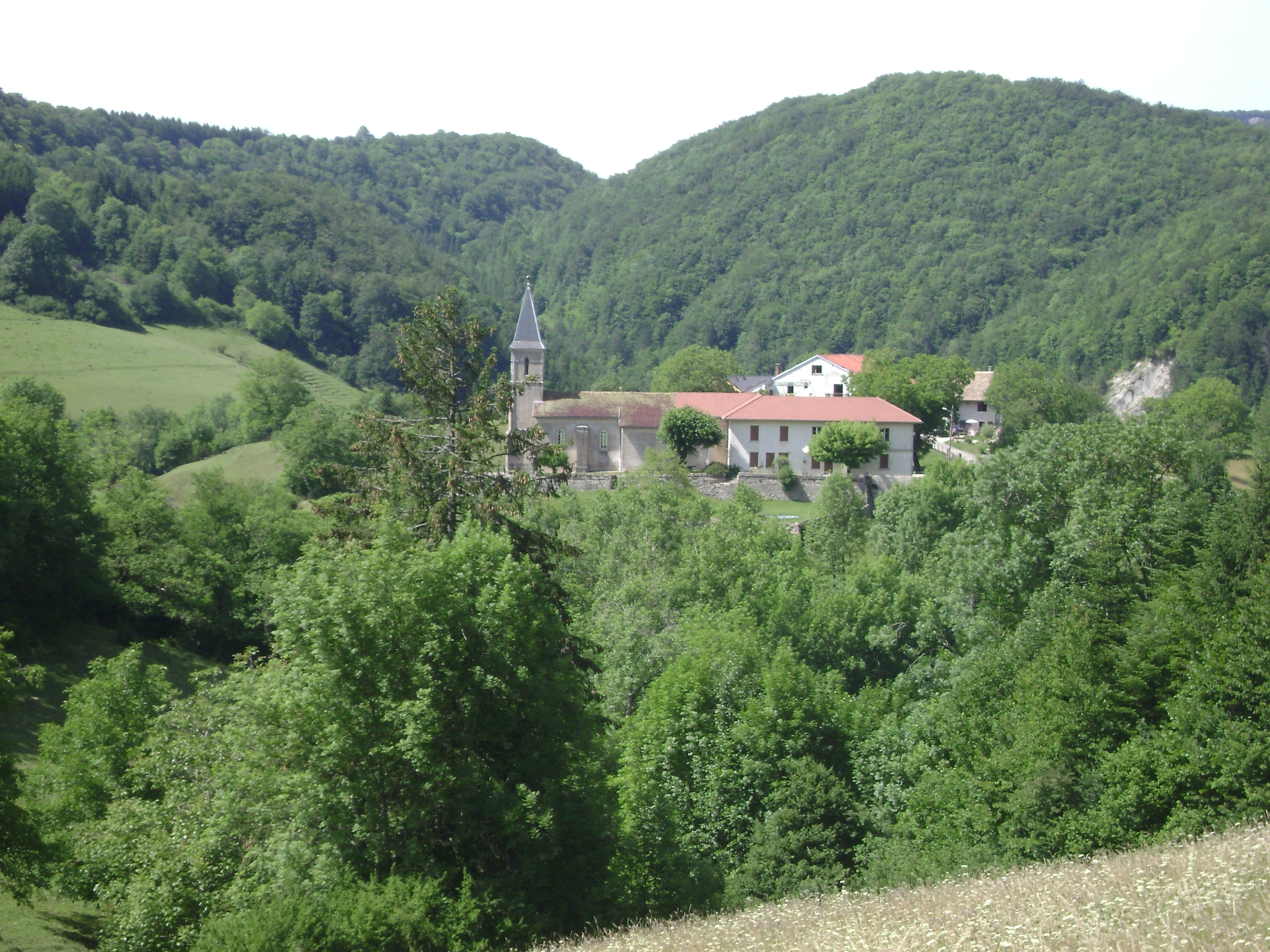 Aranc, hameau des Pézières